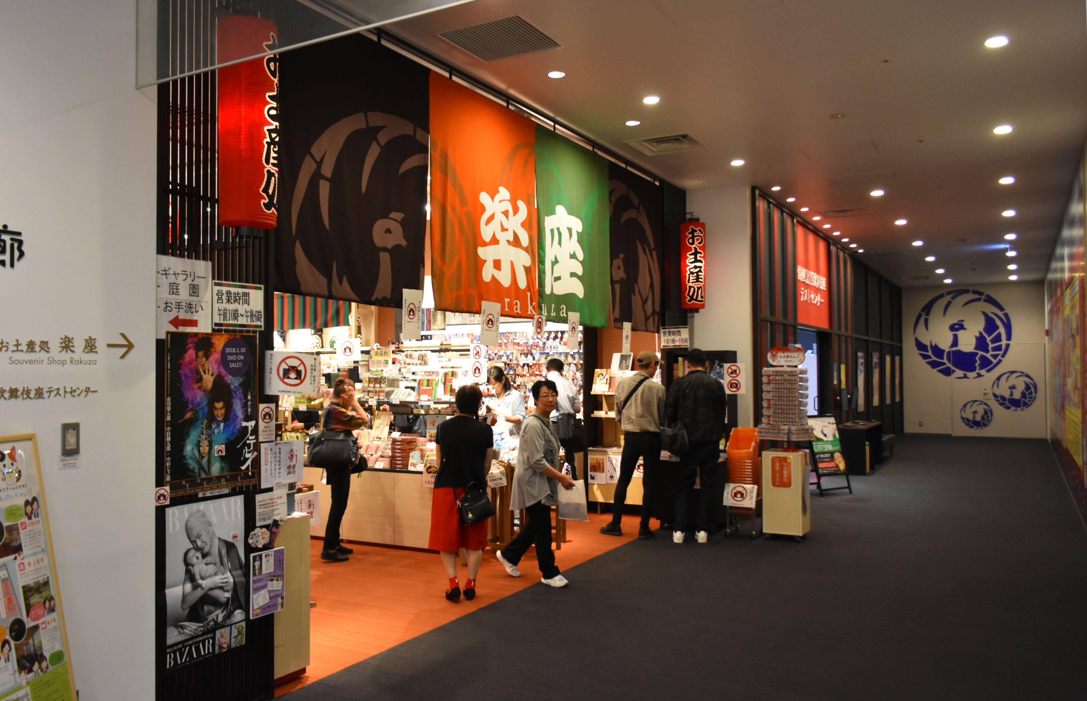 歌舞伎座 お土産処